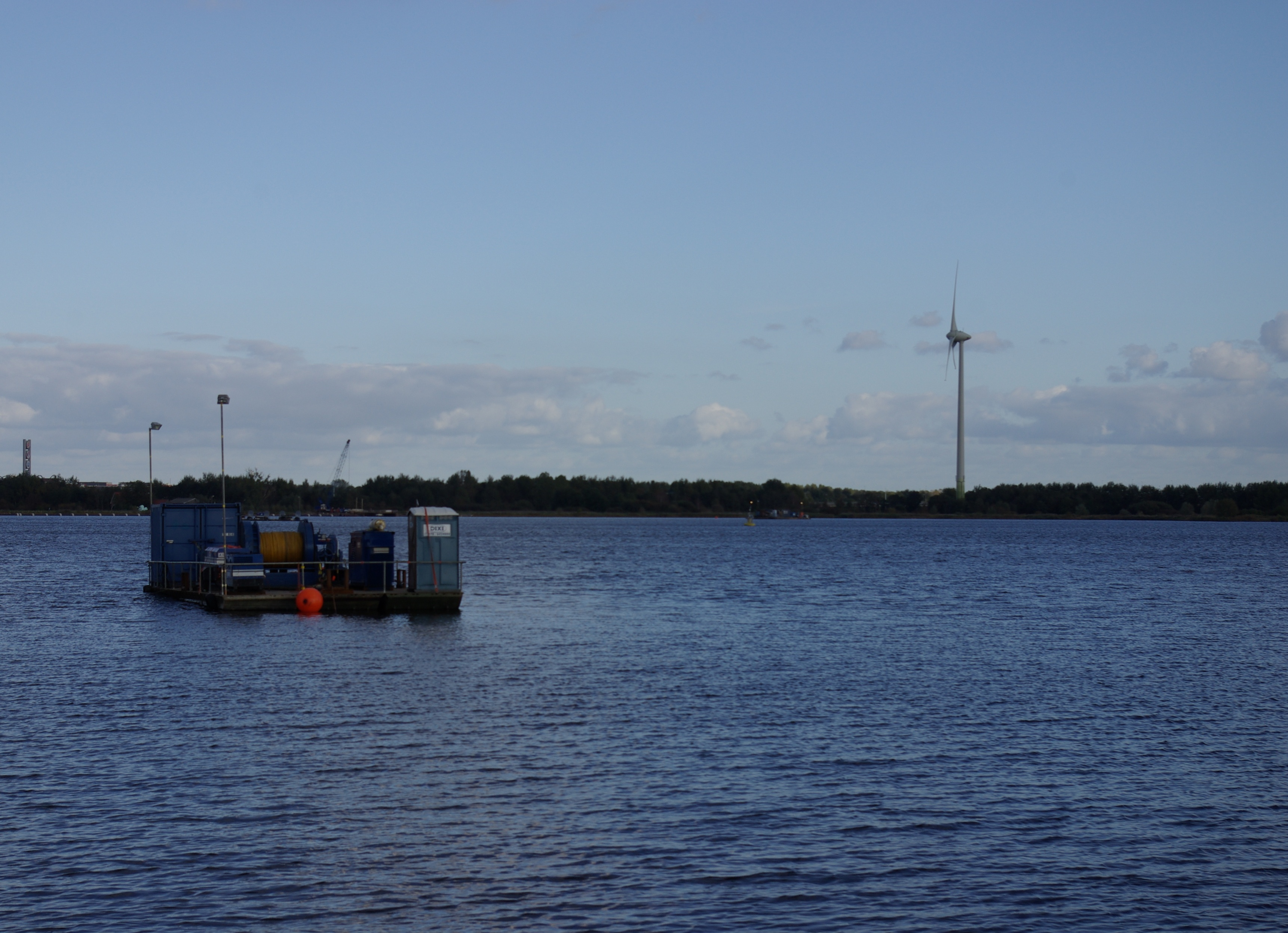 Arbeitsplattform für den Bau eines Wasserkühlungssystems für ein Amsterdamer Gewerbegebiet im See Ouderkerkerplas bei Ouderkerk aan de Amstel